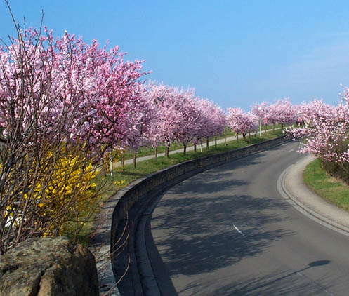 Die Mandelblüte am Gimmeldinger Neuberg im Frühjahr 2002, selbst fotografiert und freigegeben